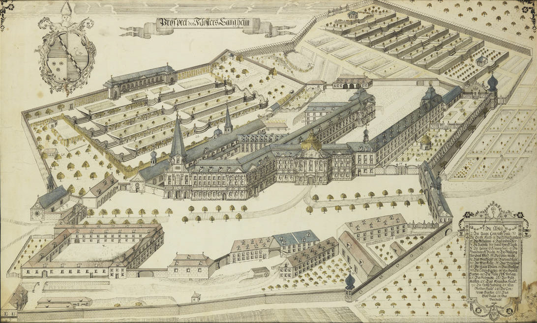 Ansicht Kloster Langheim von Südwesten. Kolorierte Federzeichnung von Alanus Bittermann, Langheim 1800 (Staatsbibliothek Bamberg, VIII A 24-d).